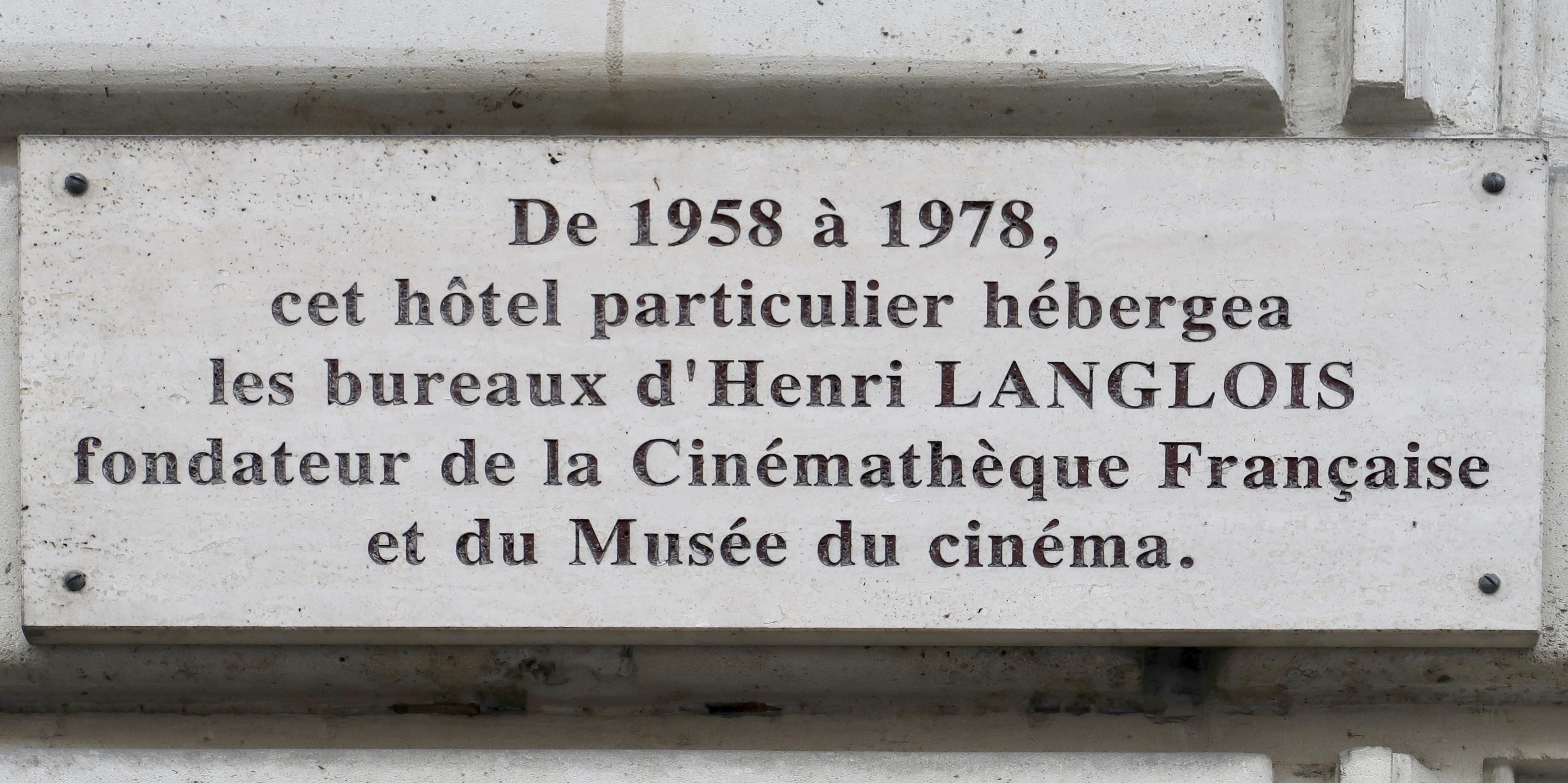 Plaque en hommage à Henri Langlois, 82 rue de Courcelles (Paris, 8e).